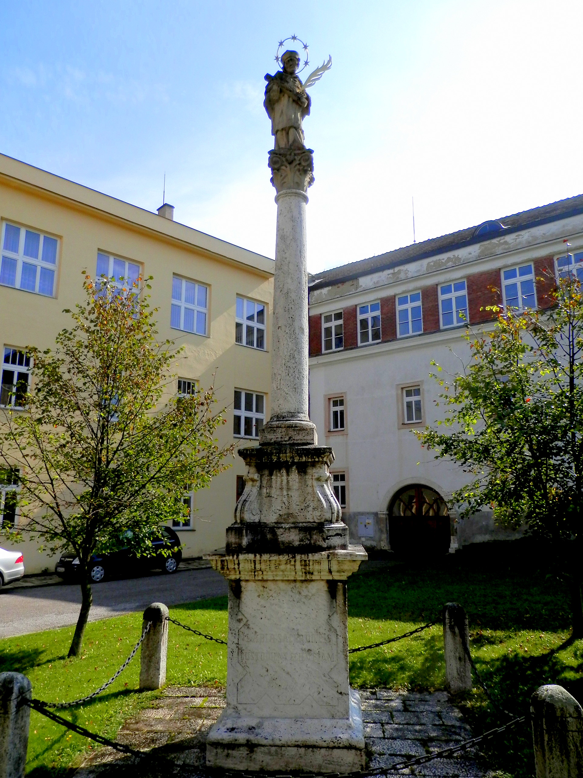 Novobararokový stĺp so sochou svätého Jána Nepomuckého. Doba vzniku 1866. Spišská Kapitula-Spišské Podhradie. V pozadí budova kňazského seminára.